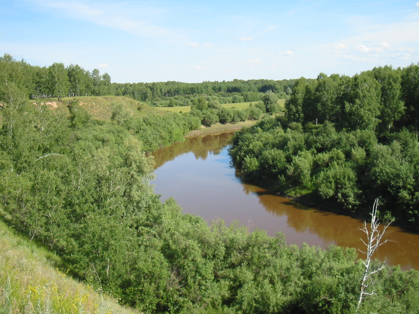 La rivero Tara. Novosibirska provinc (Rusio).